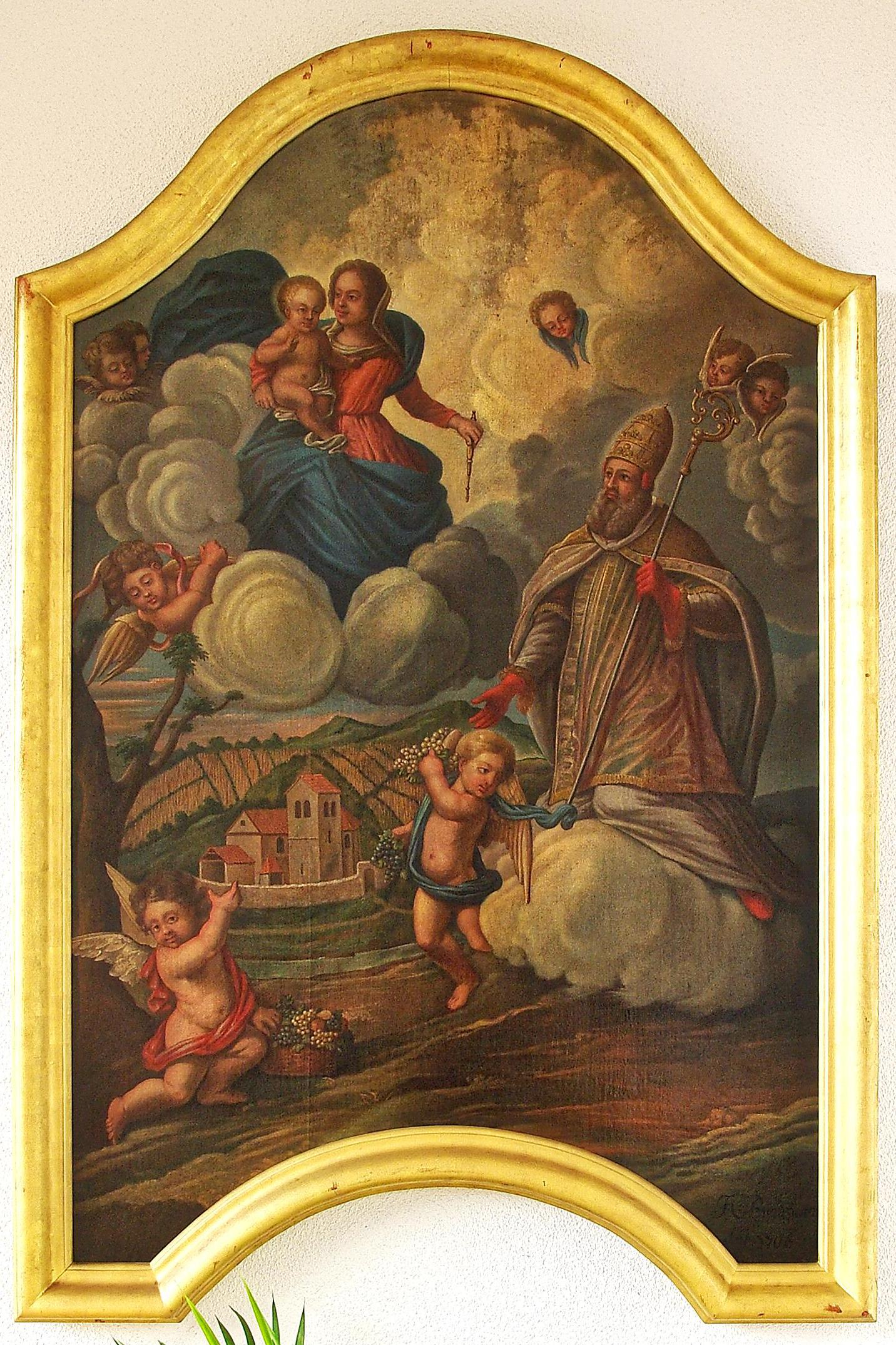 Der heiligen Urban vor der Kirche von J. Ch. Brentzinger